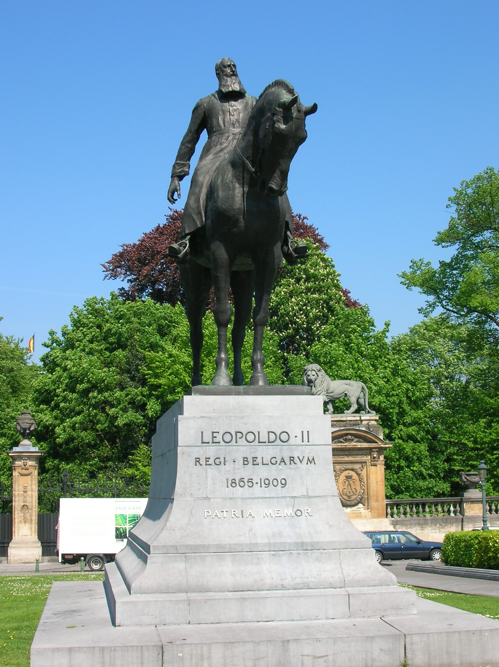 Statue de Léopold II de Belgique à Bruxelles.